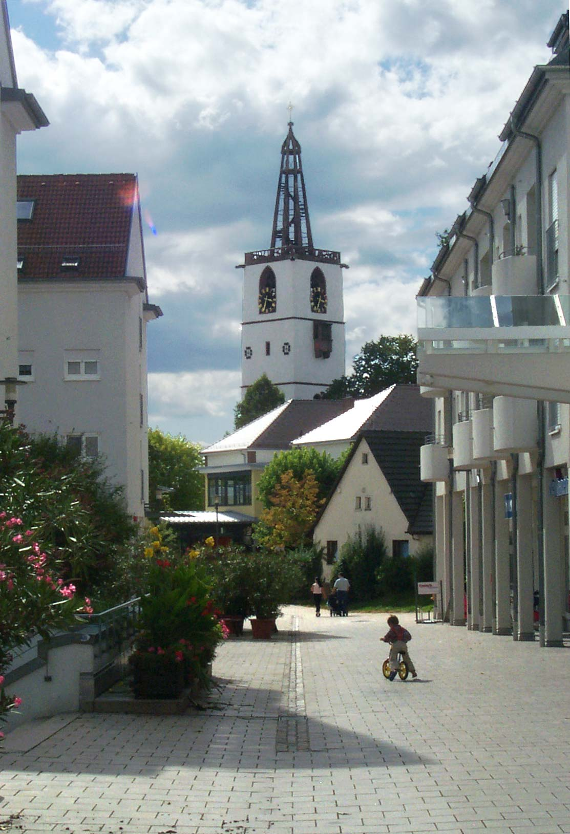 Denzlingen, September 2004.